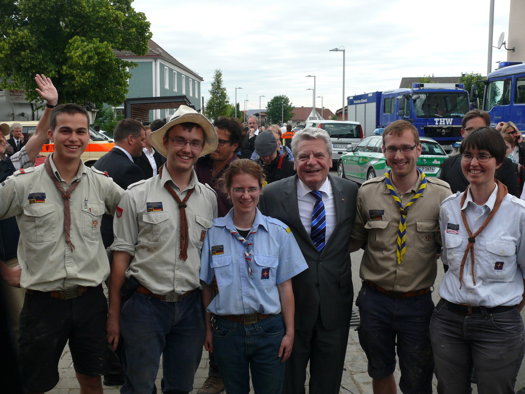 KPE Hochwassereinsatz